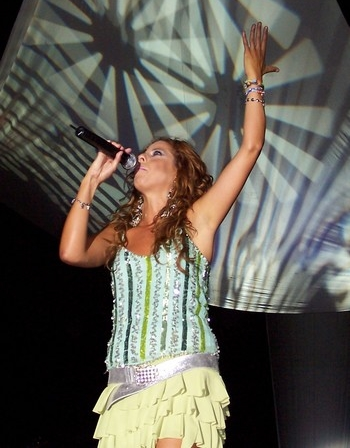 Foto Pastora Soler durante un Concierto